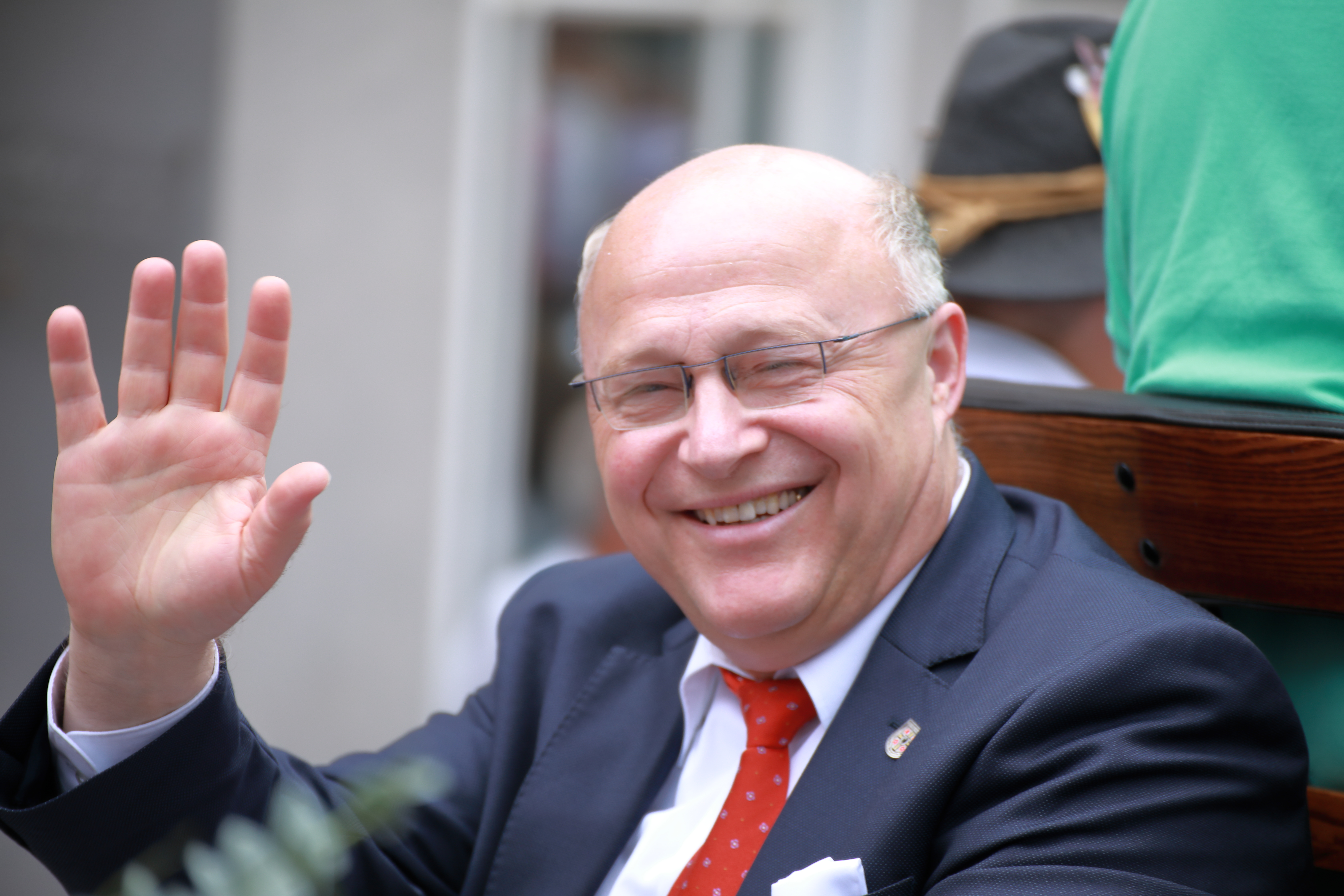 Der Historische Umzug anlässlich der 600. Weikersheimer Kärwe. Ehrengast ist Udo Glatthaar, Oberbürgermeister von Bad Mergentheim.